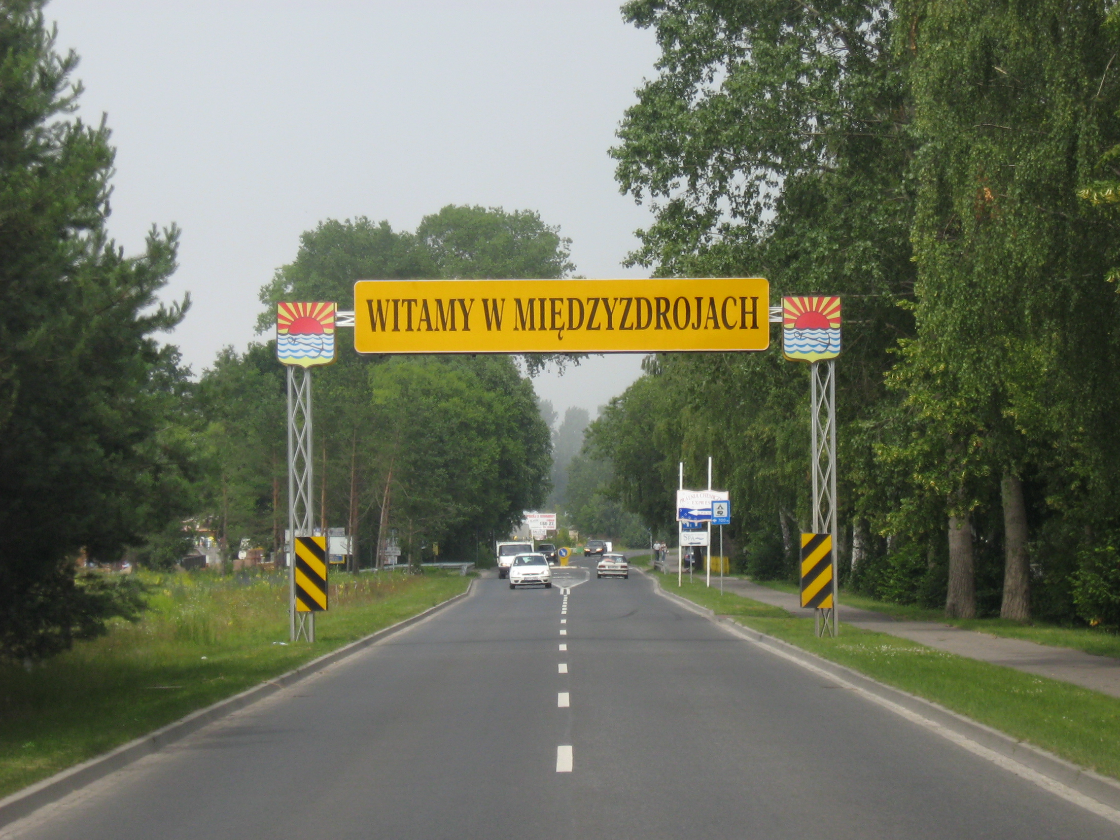 Droga wojewódzka nr 102 w Międzyzdrojach